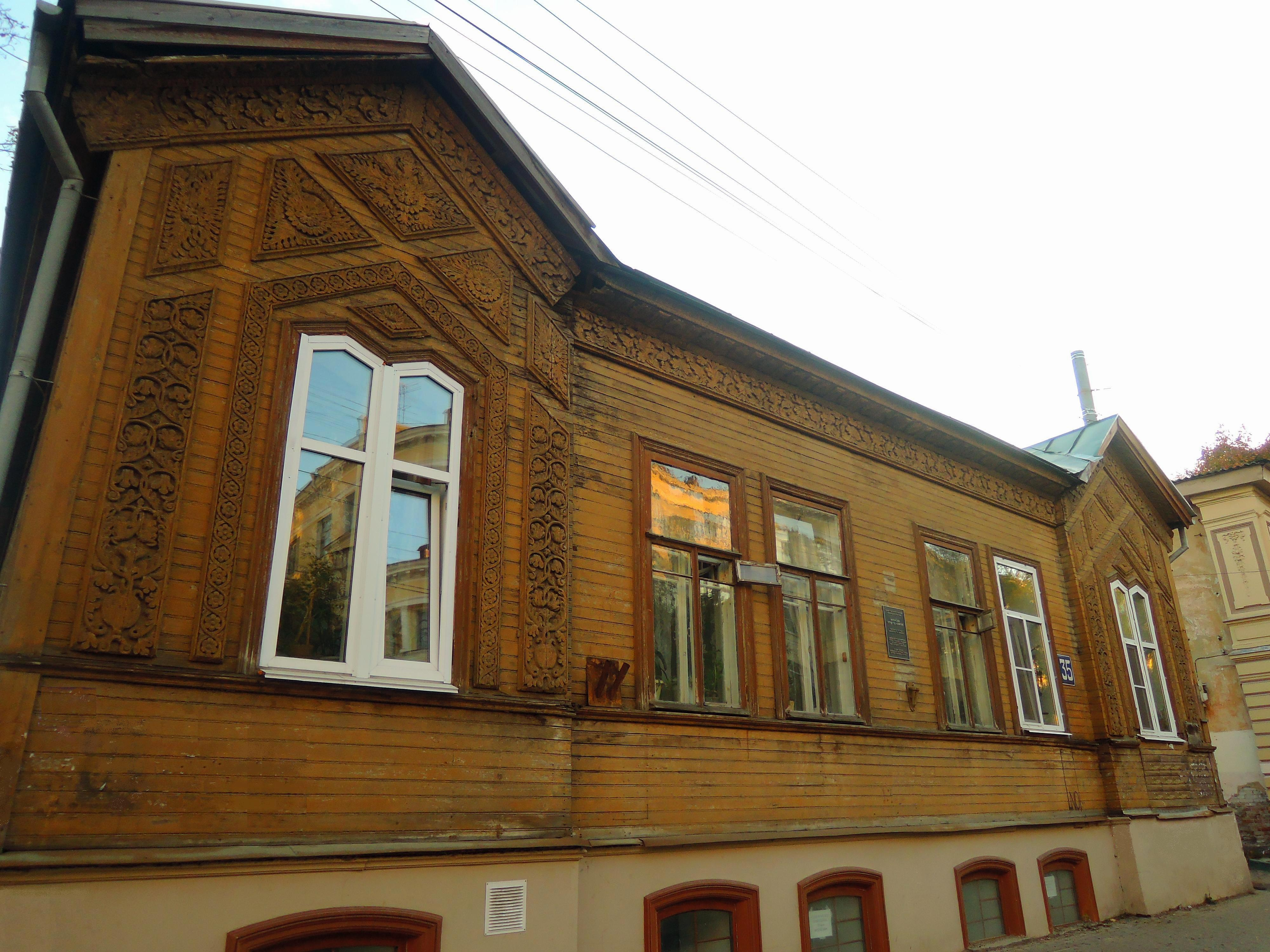 Дом жилой (Климова П.Д.): улица Большая Печерская, 35, Нижний Новгород, Нижегородская область